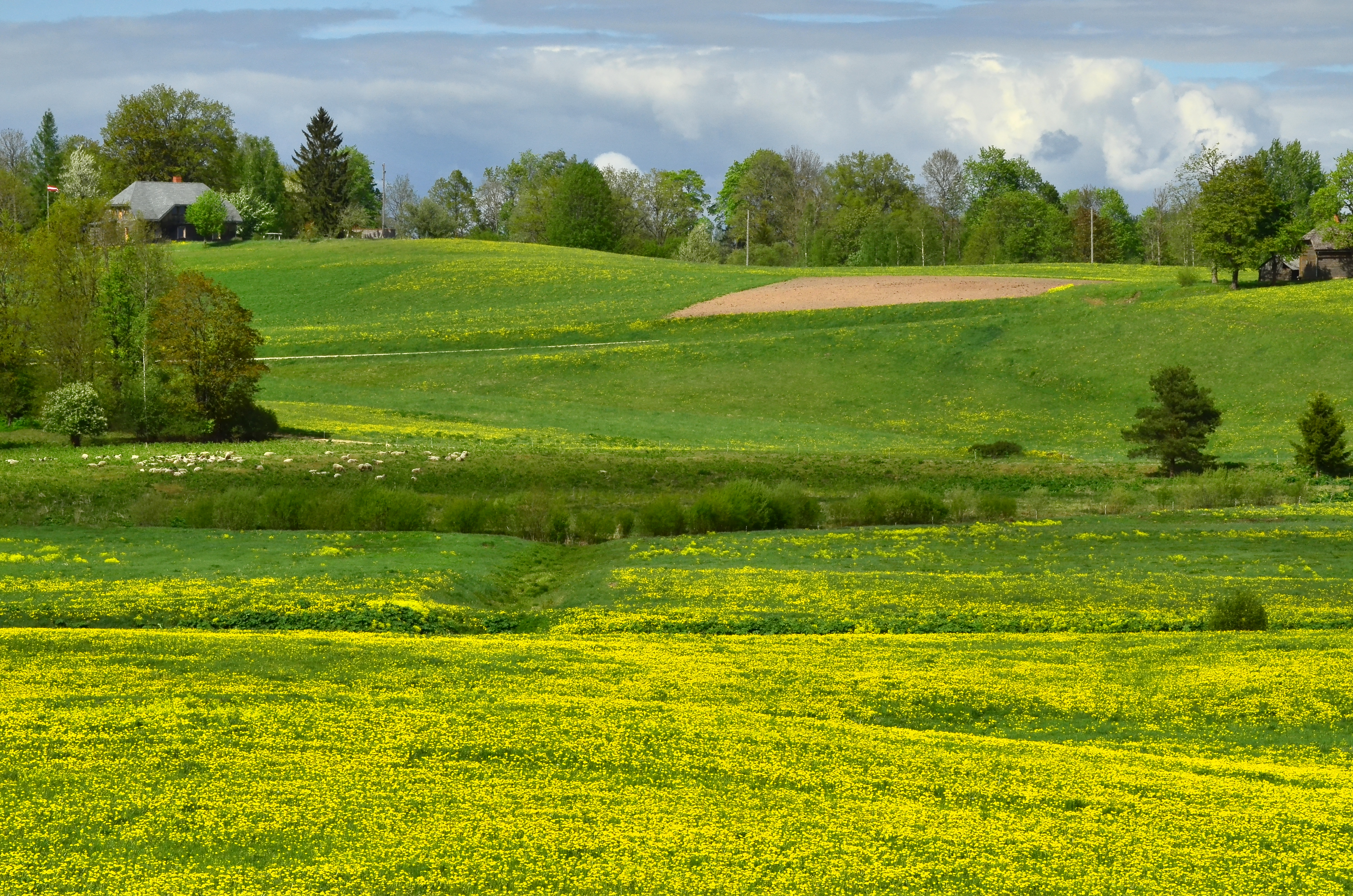 Vecpiebalga